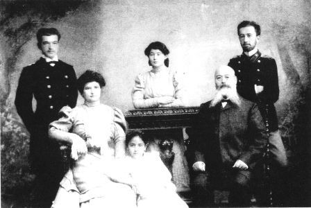 Константин и Елена Стателови, синове-Александър и Борис, дъщери-Олга и Евгения